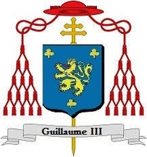 Armoiries : d'azur, au lion d'or, accompagné de trois trèfles de méme, deux- et un, qui est le MAIRE. Ecu ogivé, adossé à une crosse d'or en pal. (Communication de M. le comte de Quatrebarbes).